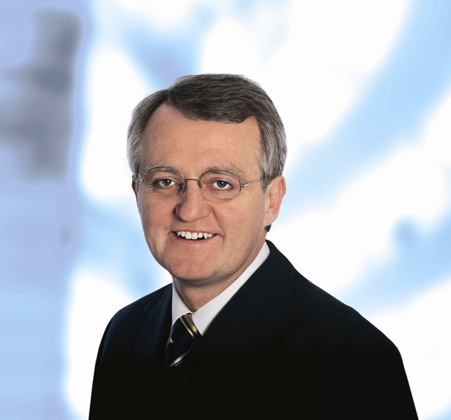 Rainer Wieland MdEP.